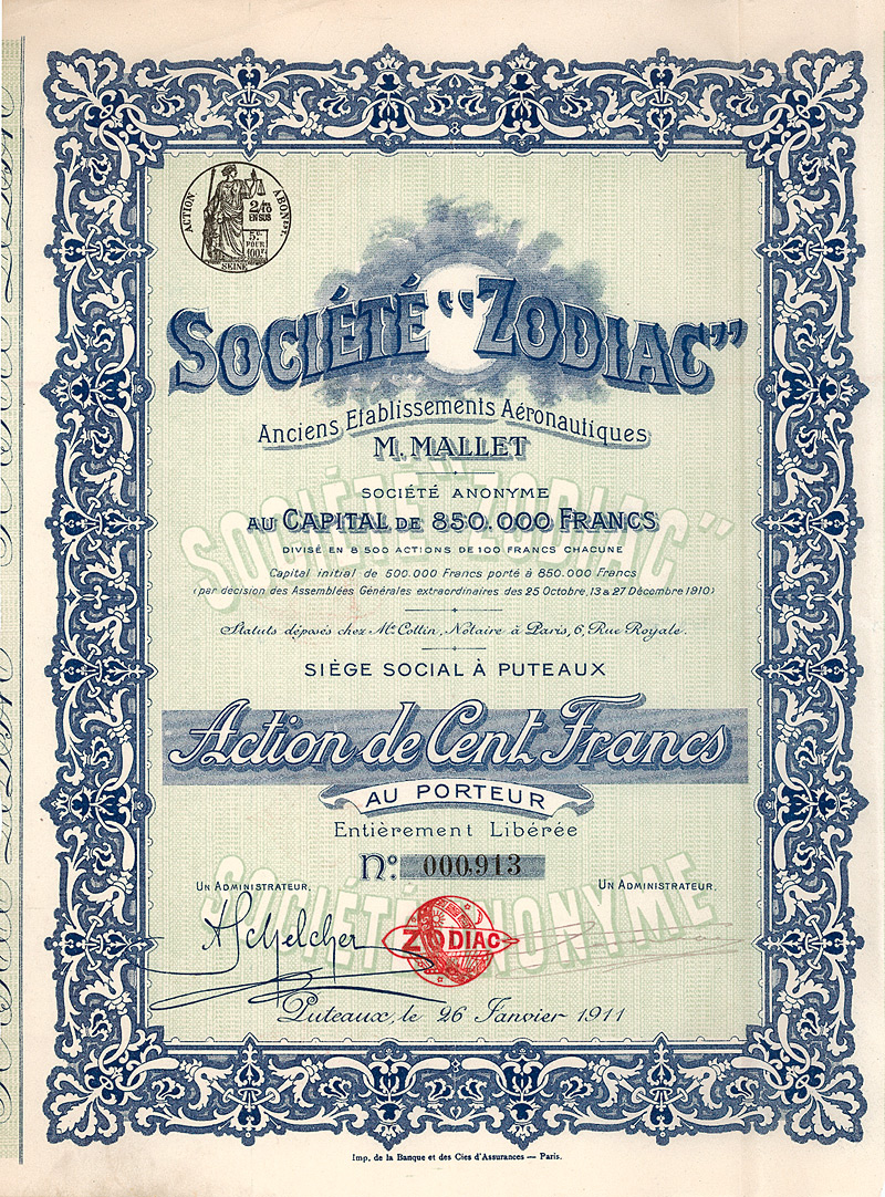 Aktie über 100 Francs der Societe Zodiac vom 26. Januar 1911